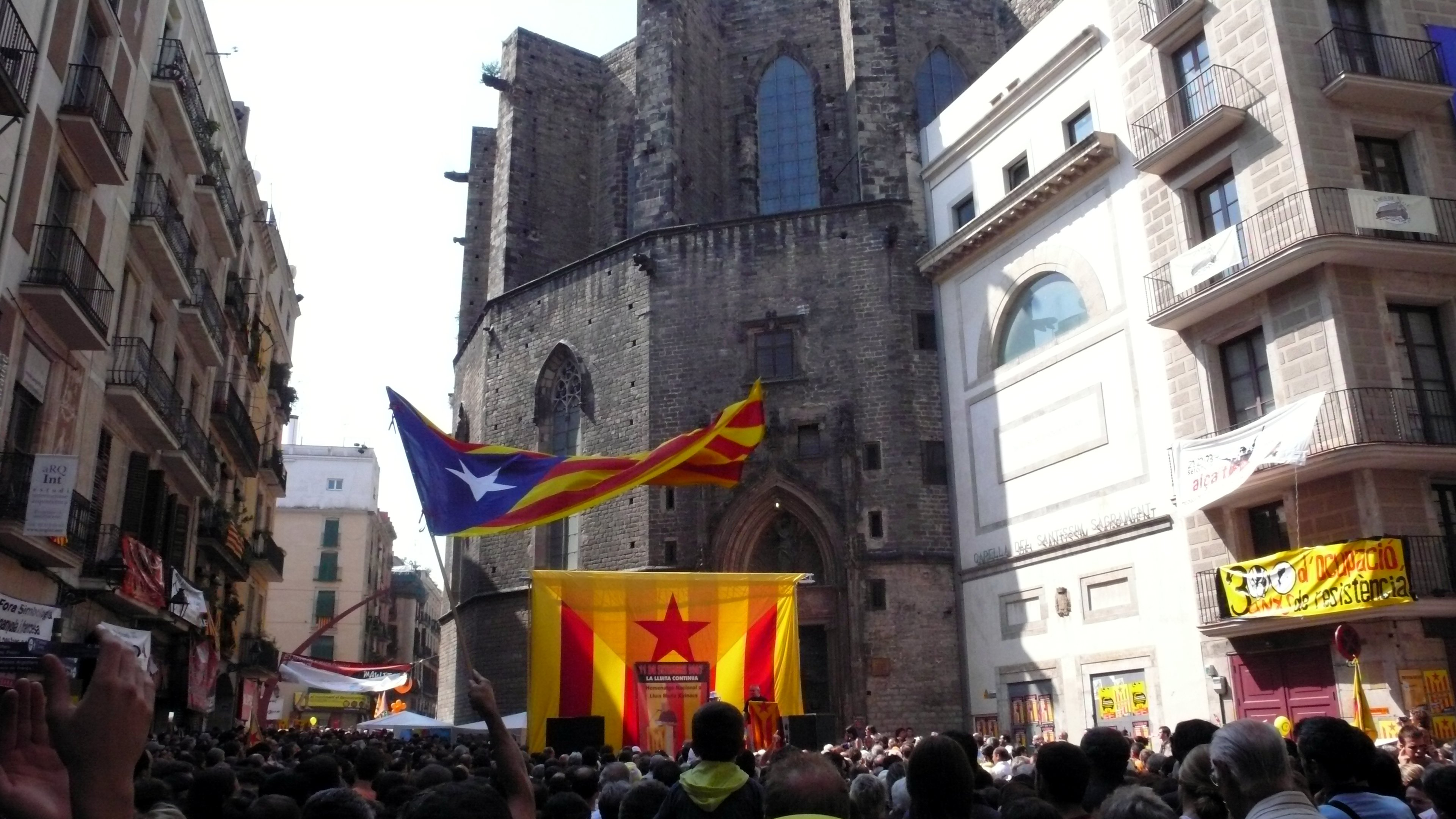 Homenatge a Lluís Maria Xirinacs, pacifista català, al Fossar de les Moreres, Barcelona.